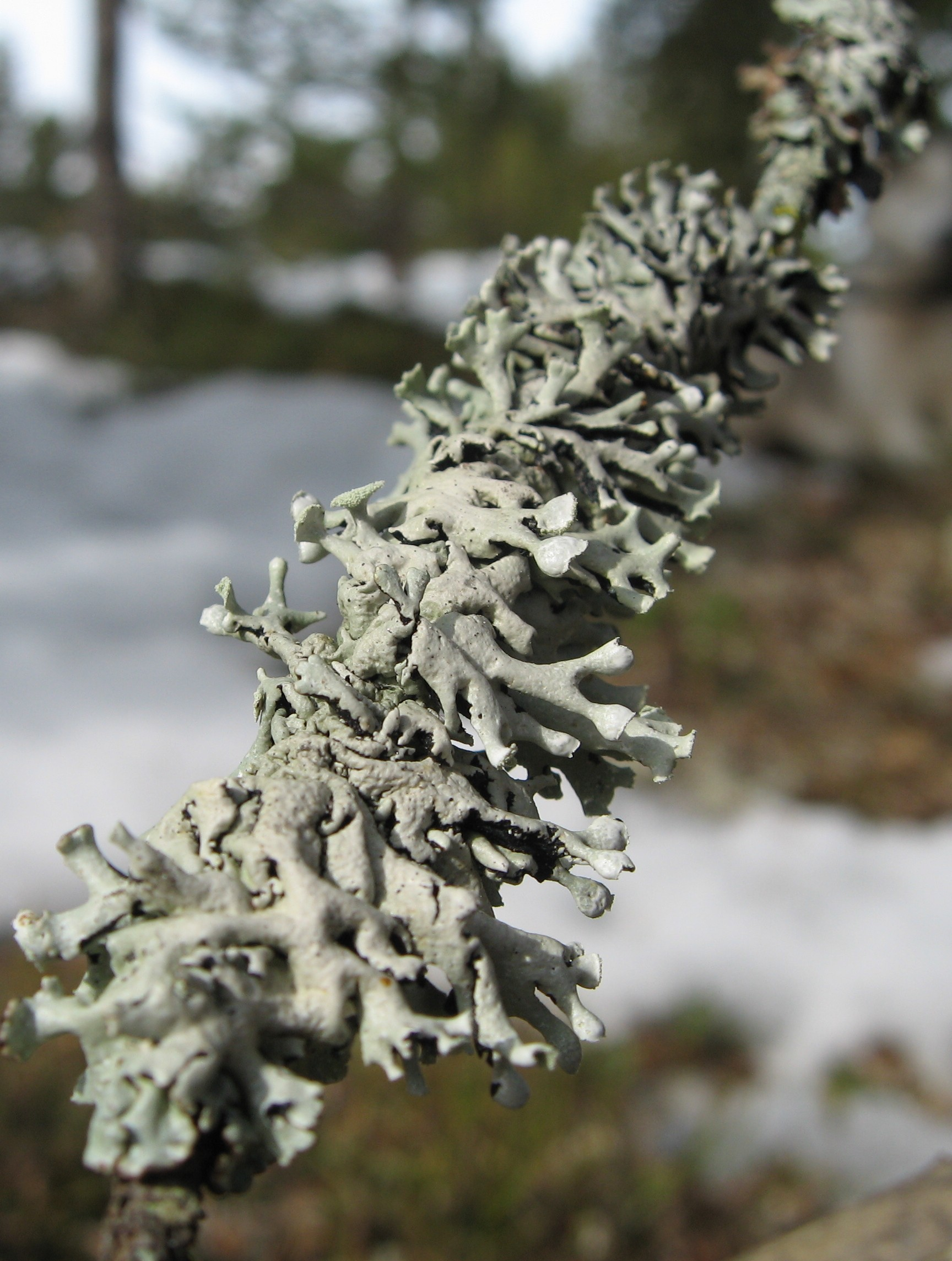 Kvistlav, Hypogymnia physodes